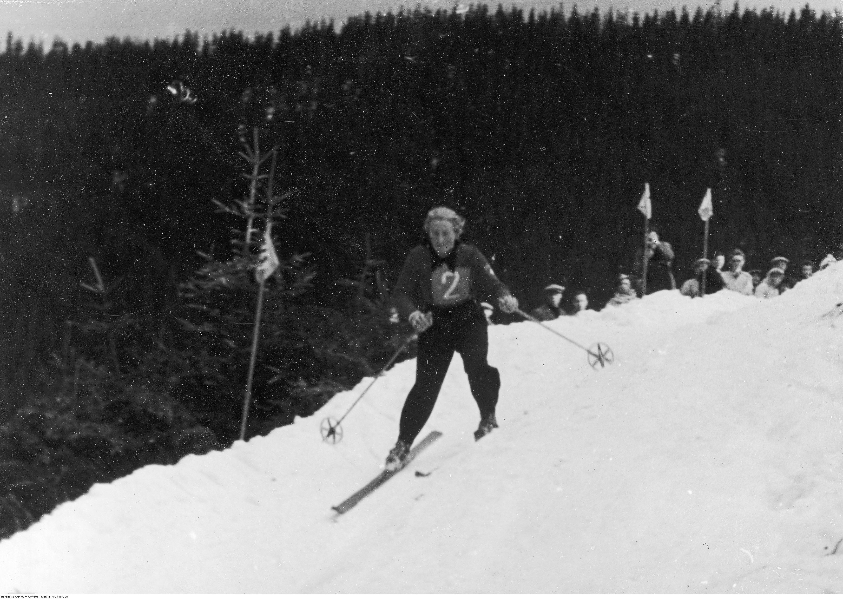 Die Schweizer Skirennläuferin Elvira Osirnig bei der WM 1939 in Zakopane